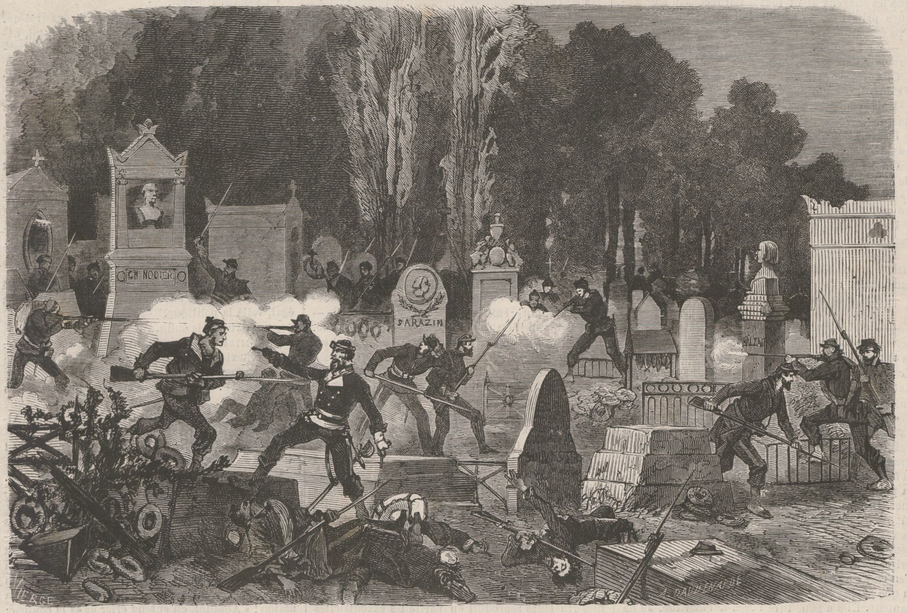 Représentation des combats qui se déroulèrent au cimetière du Père-Lachaise (divisions 48 et 49) le 27 mai 1871. Les Fédérés, qui y avaient installé l'artillerie, étaient opposés aux Versaillais. Les 147 survivants furent fusillés le lendemain devant le mur qui prit ensuite le nom de mur des Fédérés, au sud du cimetière.